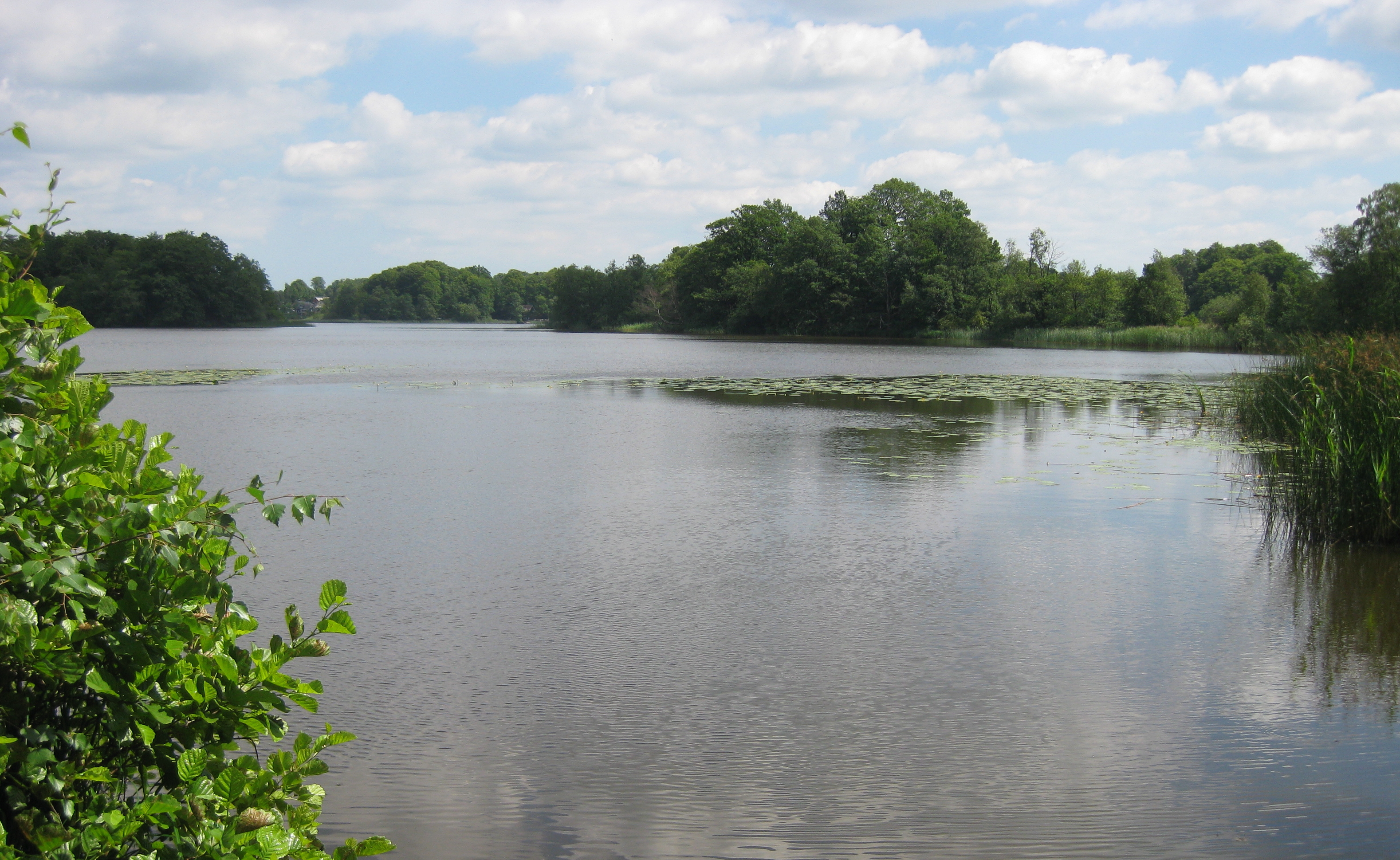 Tjörnarpasjön